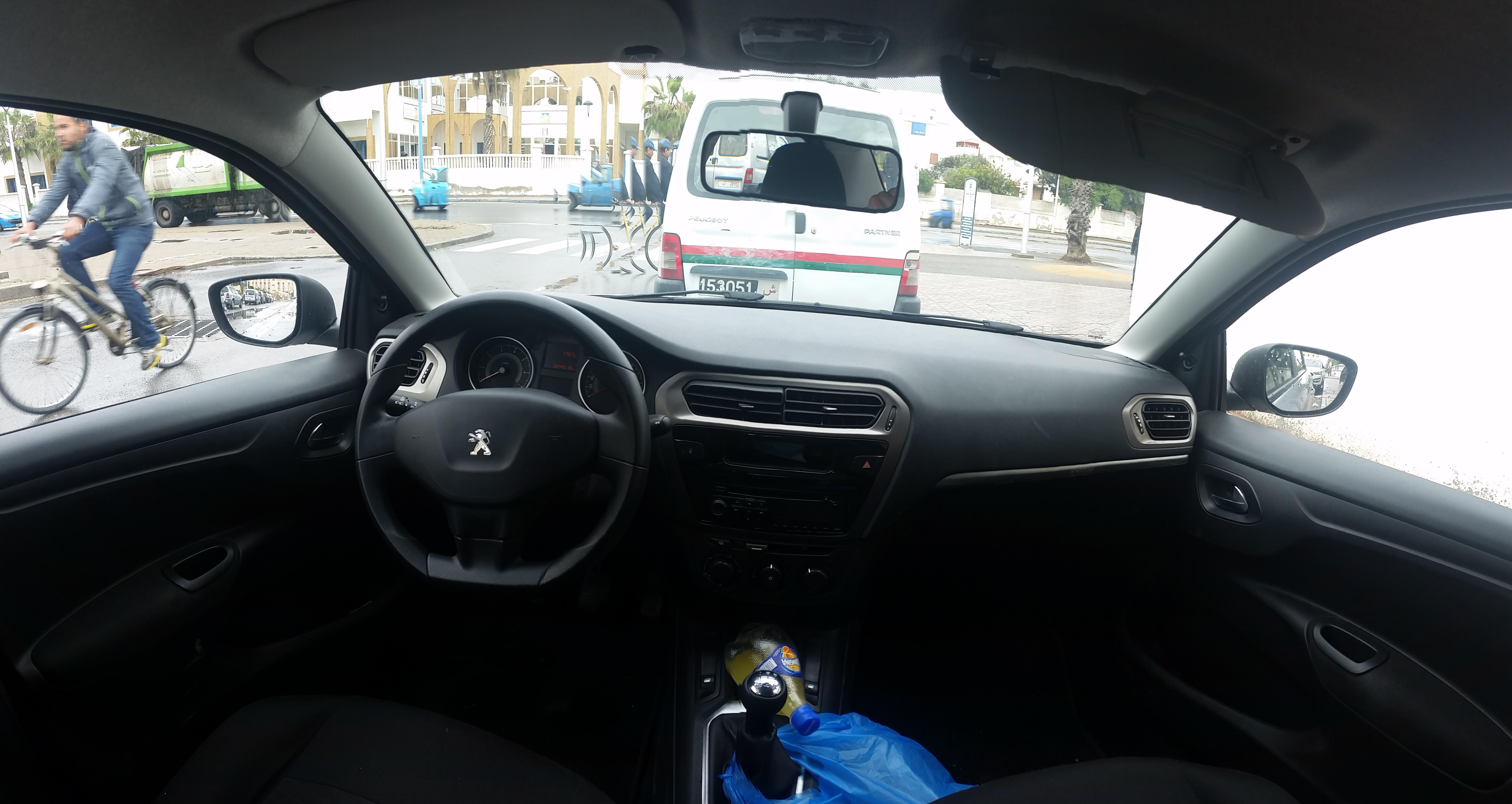 Dashboard van een Peugeot 301 in Marokko.